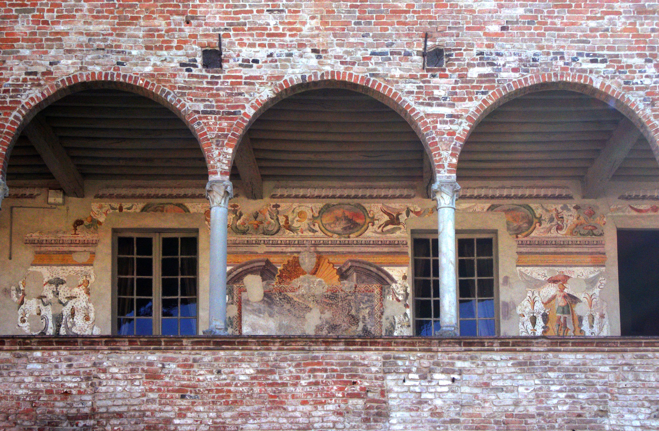 rocca Sanvitale - colonnato e affreschi This is a photo of a monument which is part of cultural heritage of Italy.